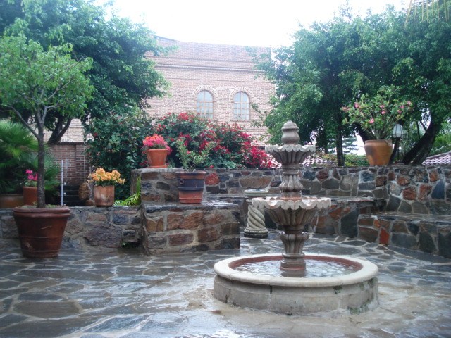 Fuente en el Todos Santos Inn